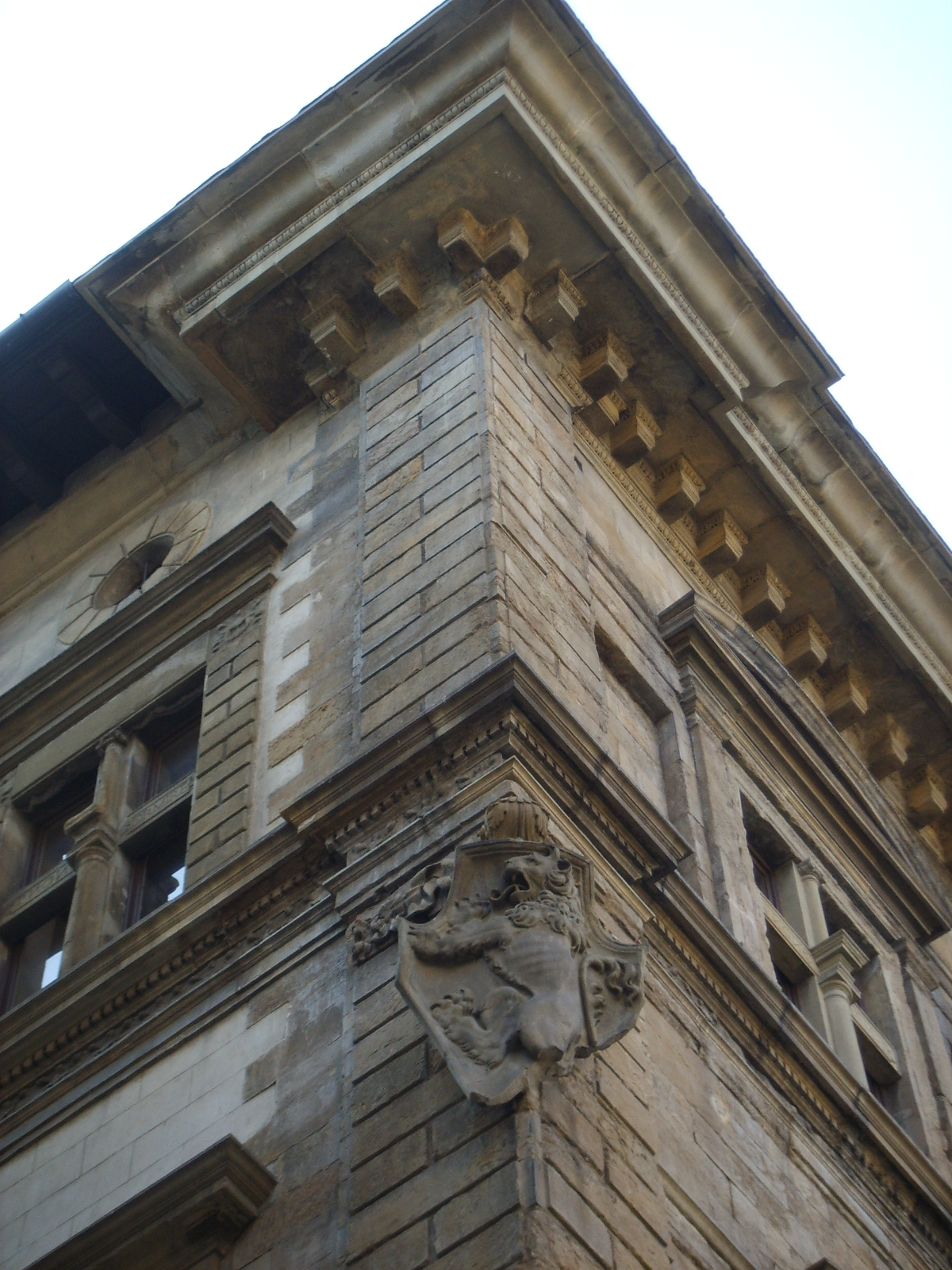 Palazzo Bartolini Salimbeni, stemma e dattaglio cornicione